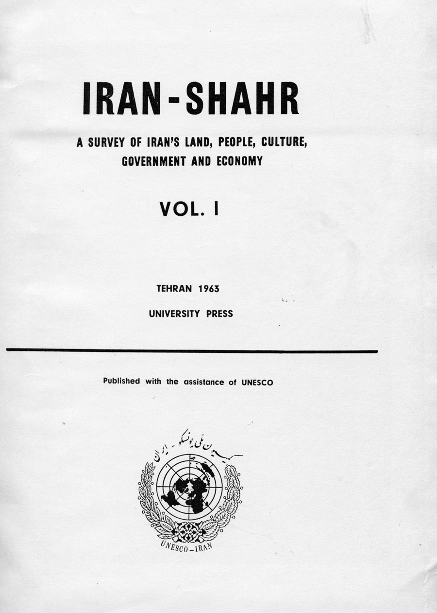 صفحه اول کتاب ایرانشهر که به سال 1969 میلادی و 1342 شمسی به چاپ رسیده است